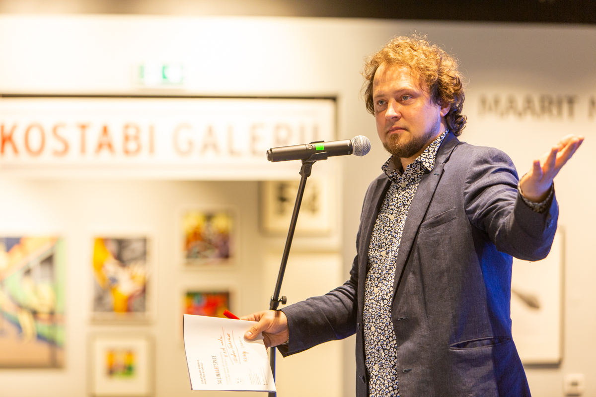 Jaak Visnap, näitus "Vabadus 21. sajandil"